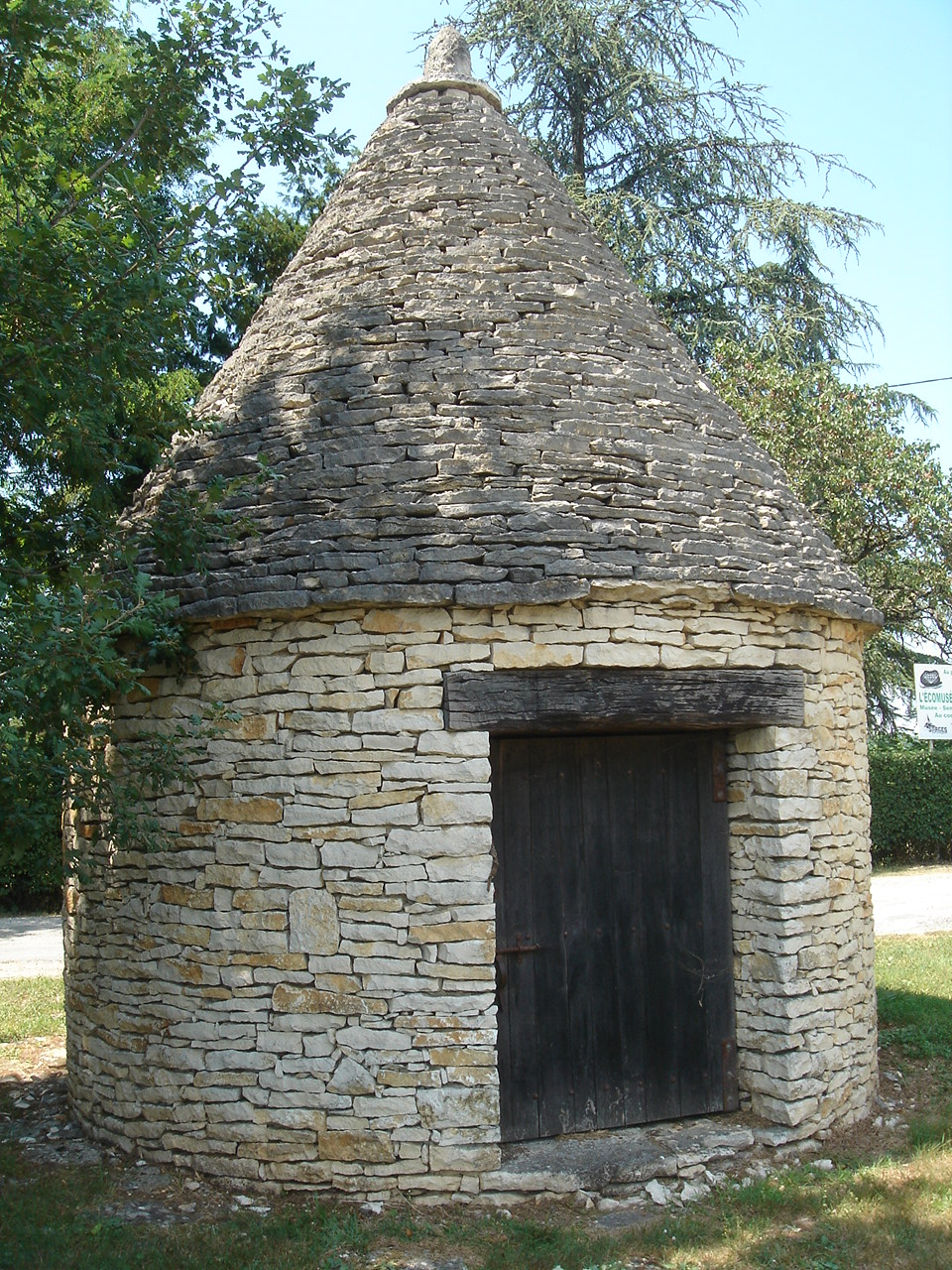 Eine Borie, aus Trockensteinen errichteter Unterstand. Aufgenommen im Juli 2006 von Benutzer:Bordeaux in der Nähe von Sorges (24), Frankreich.